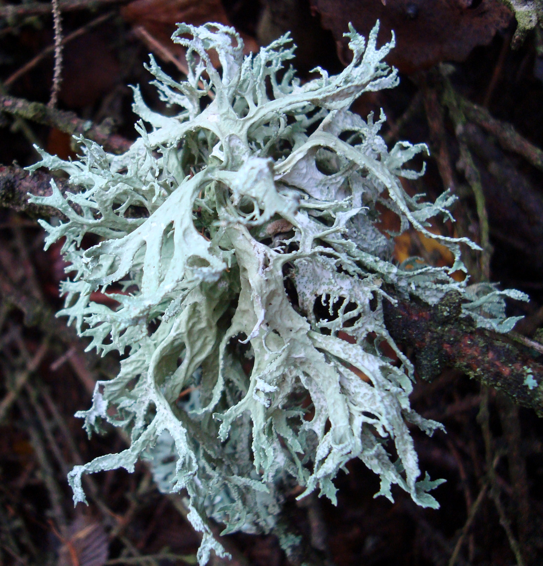 Lišejník větvičník slívový - Evernia prunastri z Podkomorských lesů, Česká republika, jižní Morava